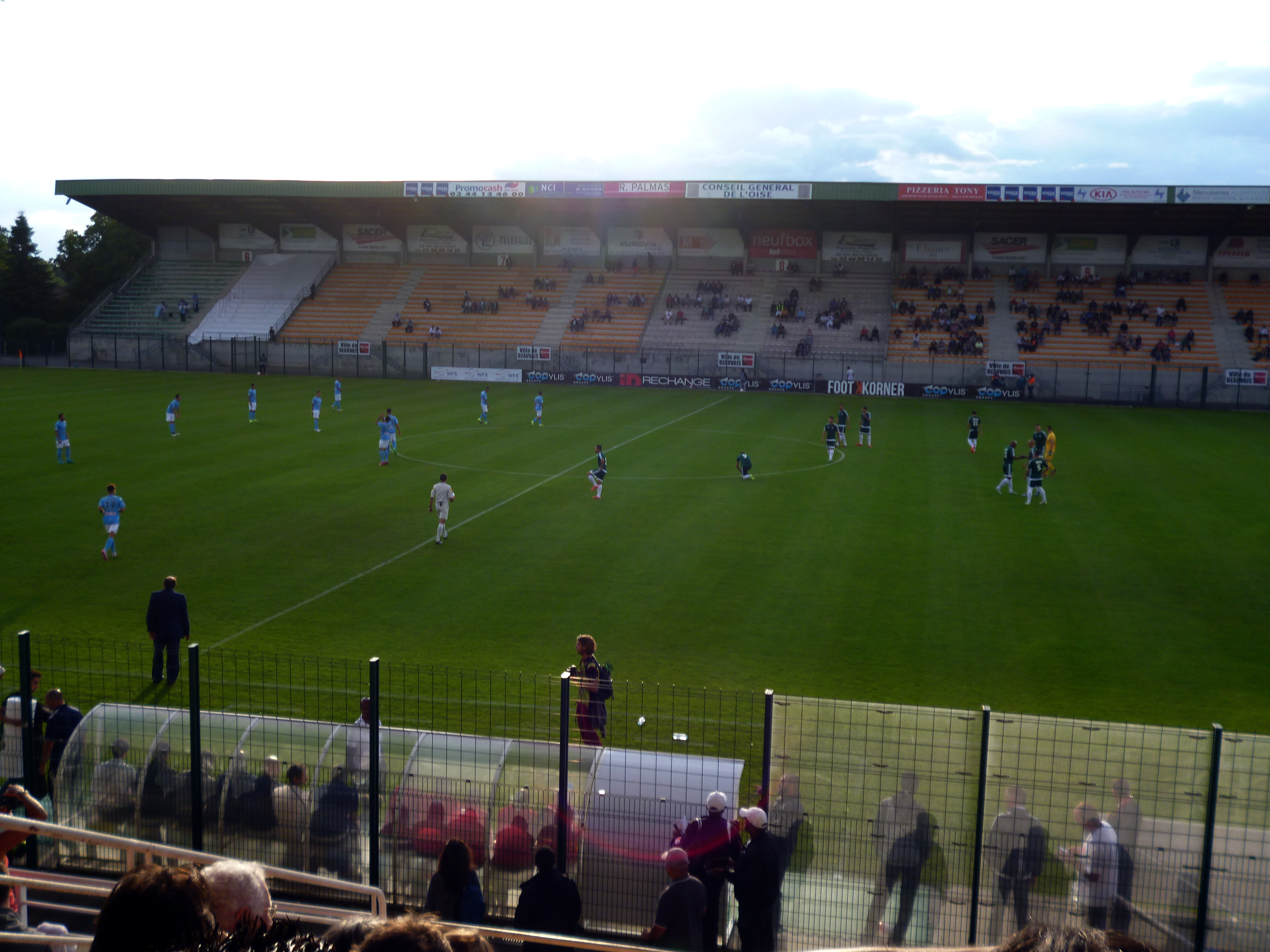 Match de football, du championnat Ligue 2, le 14 août 2015, entre le Red Star Football Club et Tours Football Club, disputé au stade Pierre-Brisson de Beauvais (Oise).